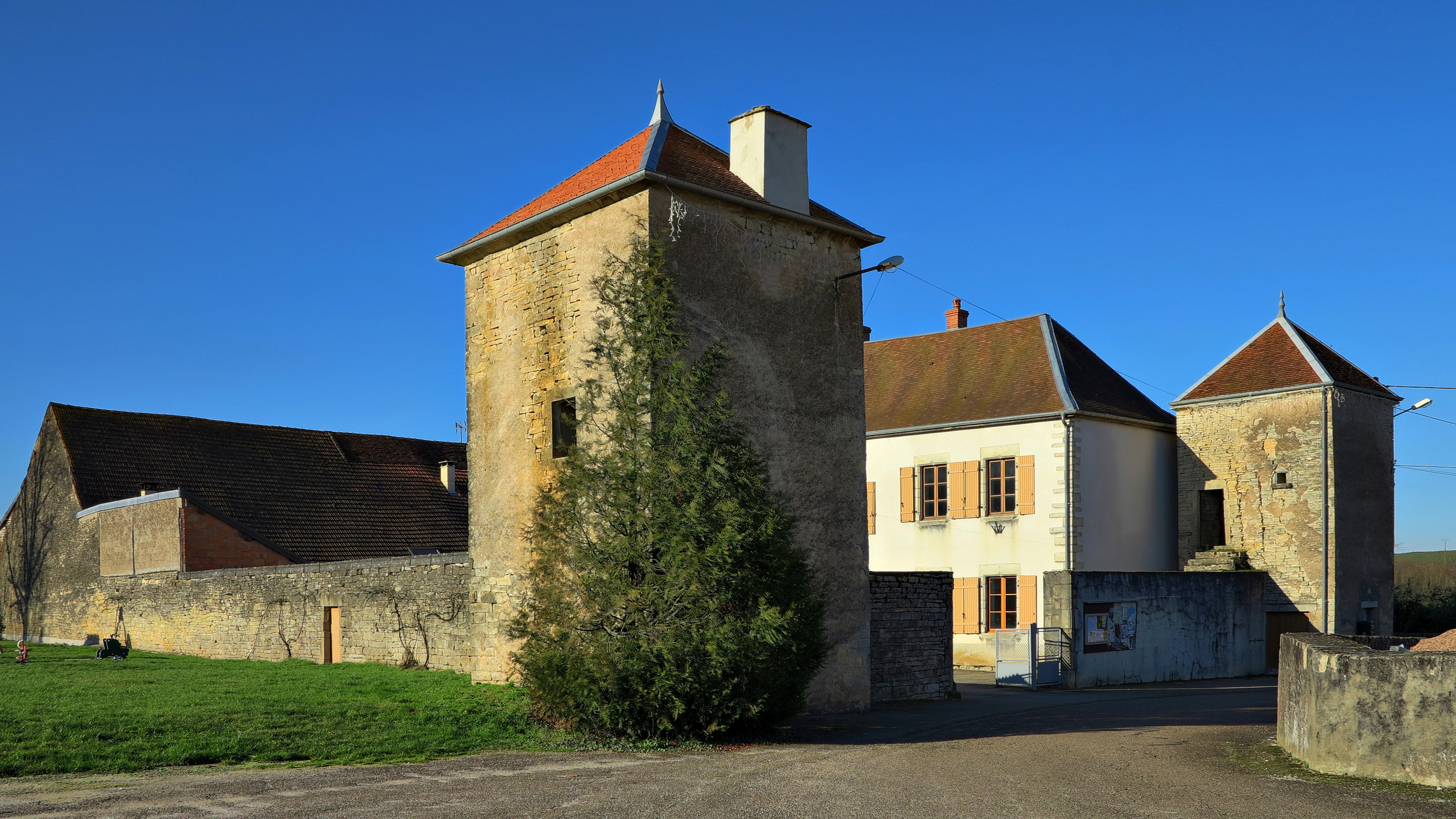 Hôtel de ville de Cult